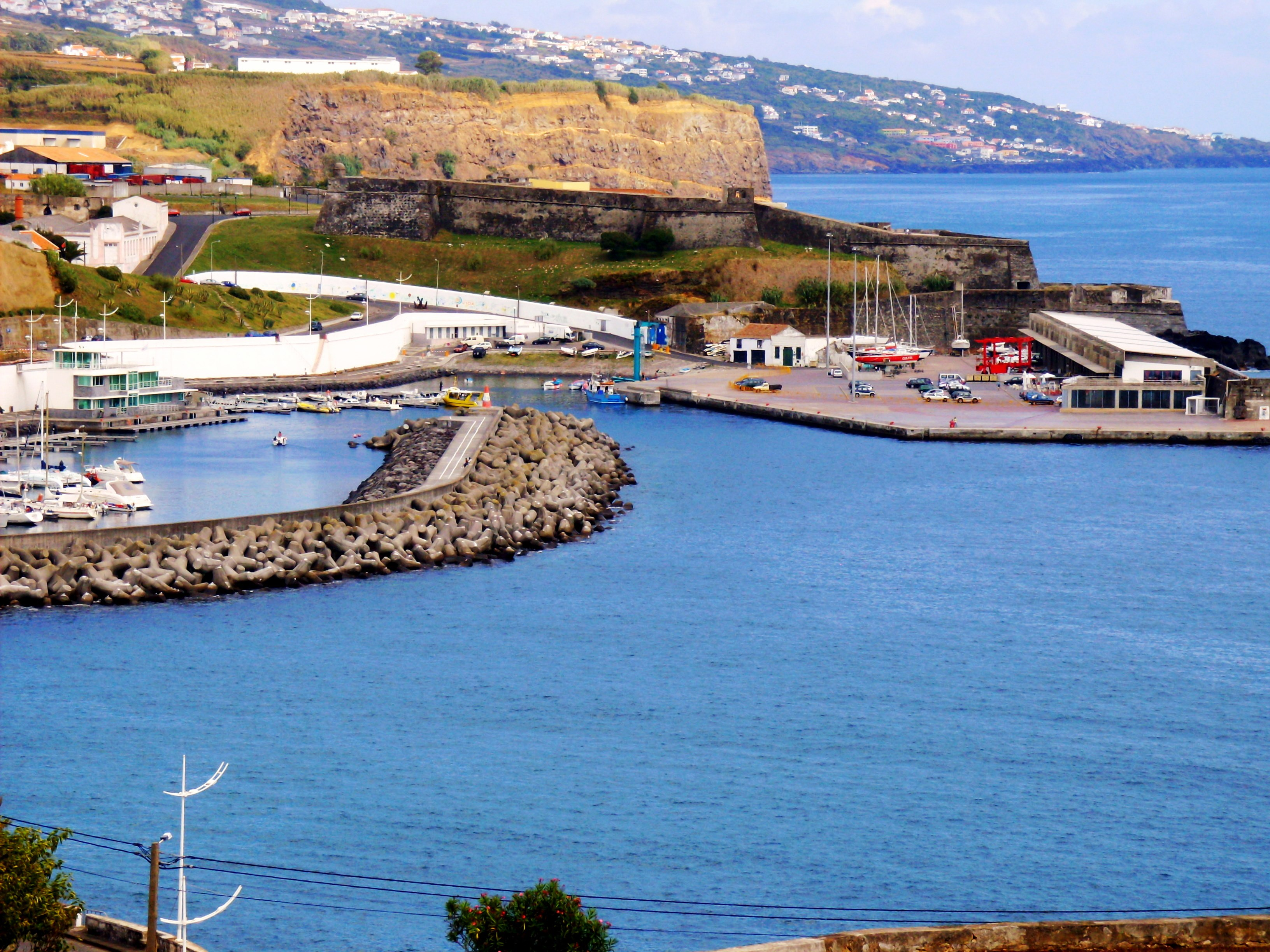 Forte de São Sebastião, freguesia de Nossa Senhora da Conceição, cidade e concelho de Angra do Heroísmo, ilha Terceira, Açores.